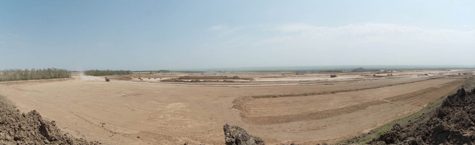 Строительство аэропорта "Южный" в Ростове-на-Дону